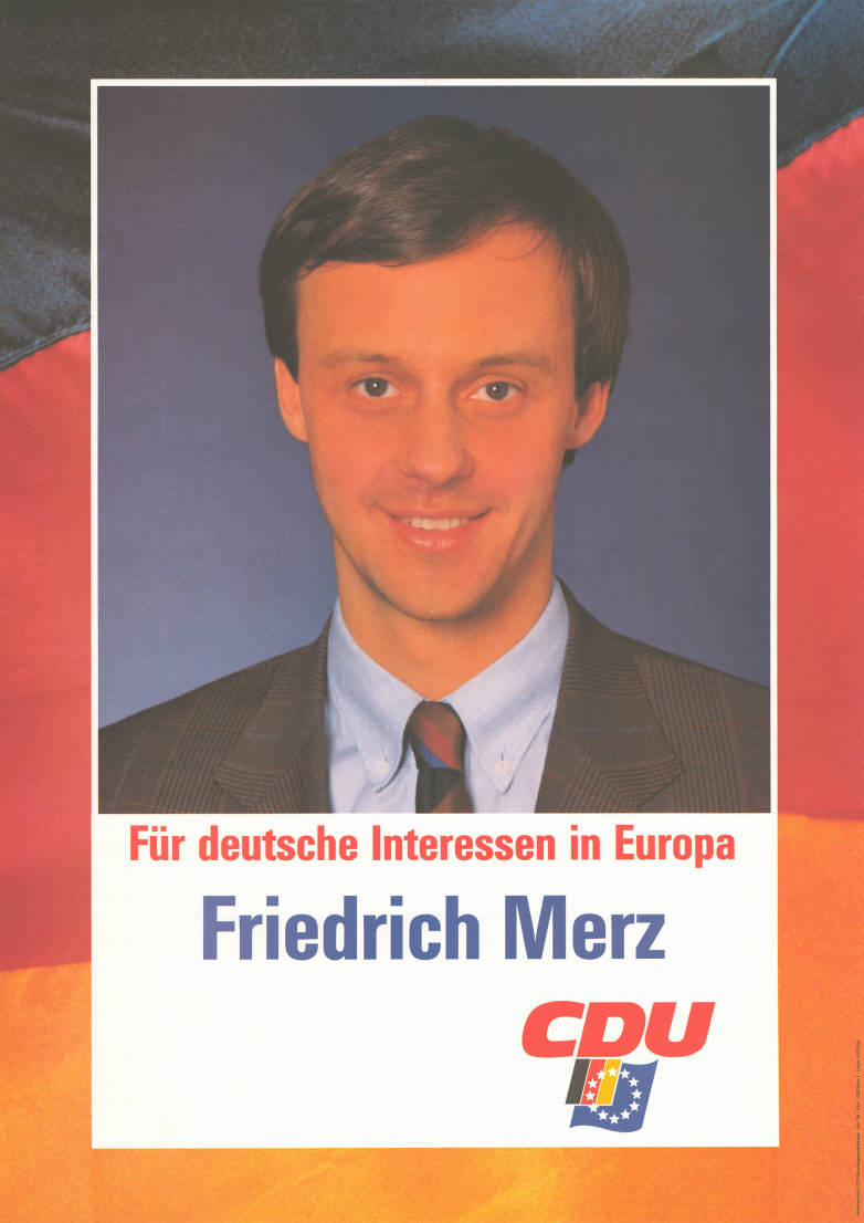 Für deutsche Interessen in Europa Friedrich Merz CDUAbbildung:Porträtfoto - NationalfarbenPlakatart:Kandidaten-/Personenplakat mit PorträtAuftraggeber:CDU-Bundesgeschäftsstelle, Abt. Öffentlichkeitsarbeit, Konrad-Adenauer-Haus, BonnDrucker_Druckart_Druckort:KVD, KölnObjekt-Signatur:10-030 : 229Bestand:Europawahlplakate ( 10-030)GliederungBestand10-18:Europawahlplakate (10-030) » CDULizenz:KAS/ACDP 10-030 : 229 CC-BY-SA 3.0 DE